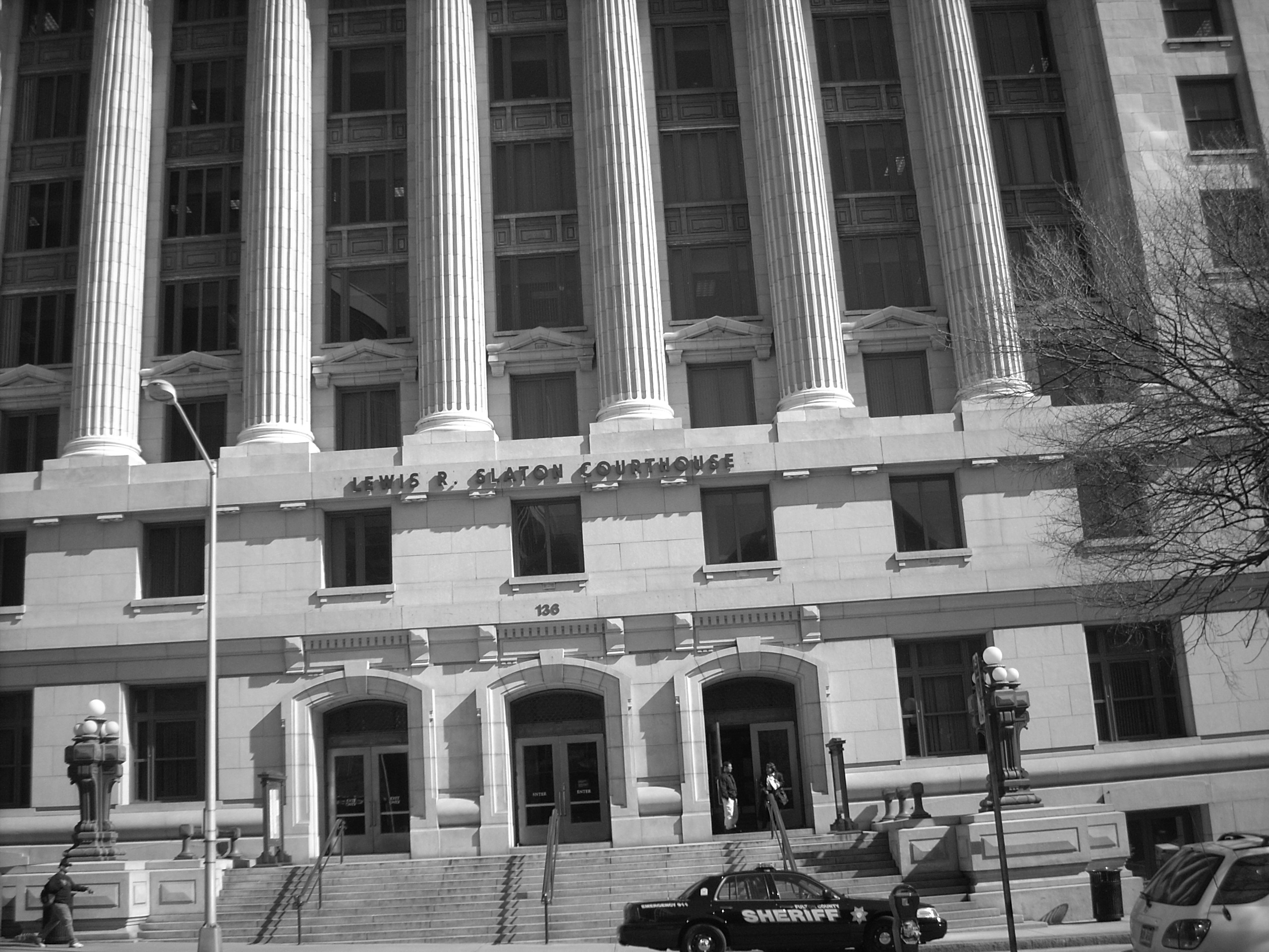 בניין בית המשפט באטלנטה 12 במרץ 2008